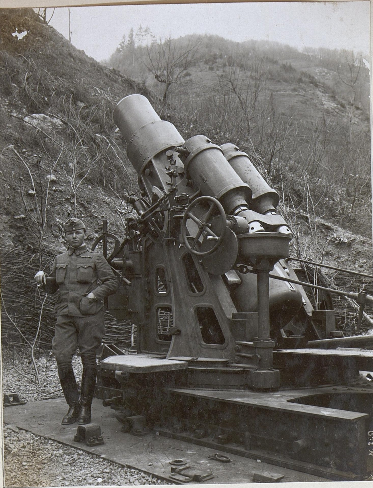 30.5 cm Mörser in Feuerstellung